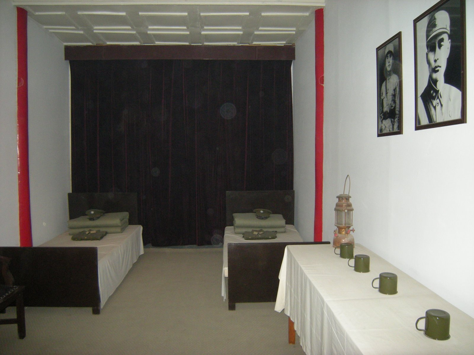 陕西临潼华清池景区内五间厅内的房间